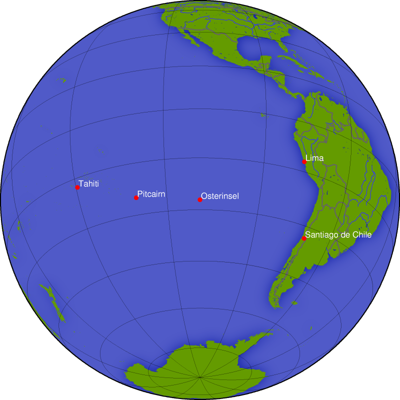 Die Lage der Osterinsel